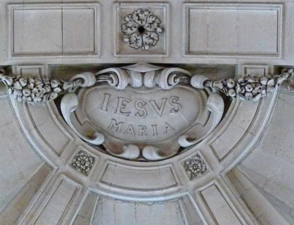 Clef de voute de l'abside du temple protestant de l'Oratoire du Louvre, avec la devise de la Congrégation de l'Oratoire JESUS MARIA